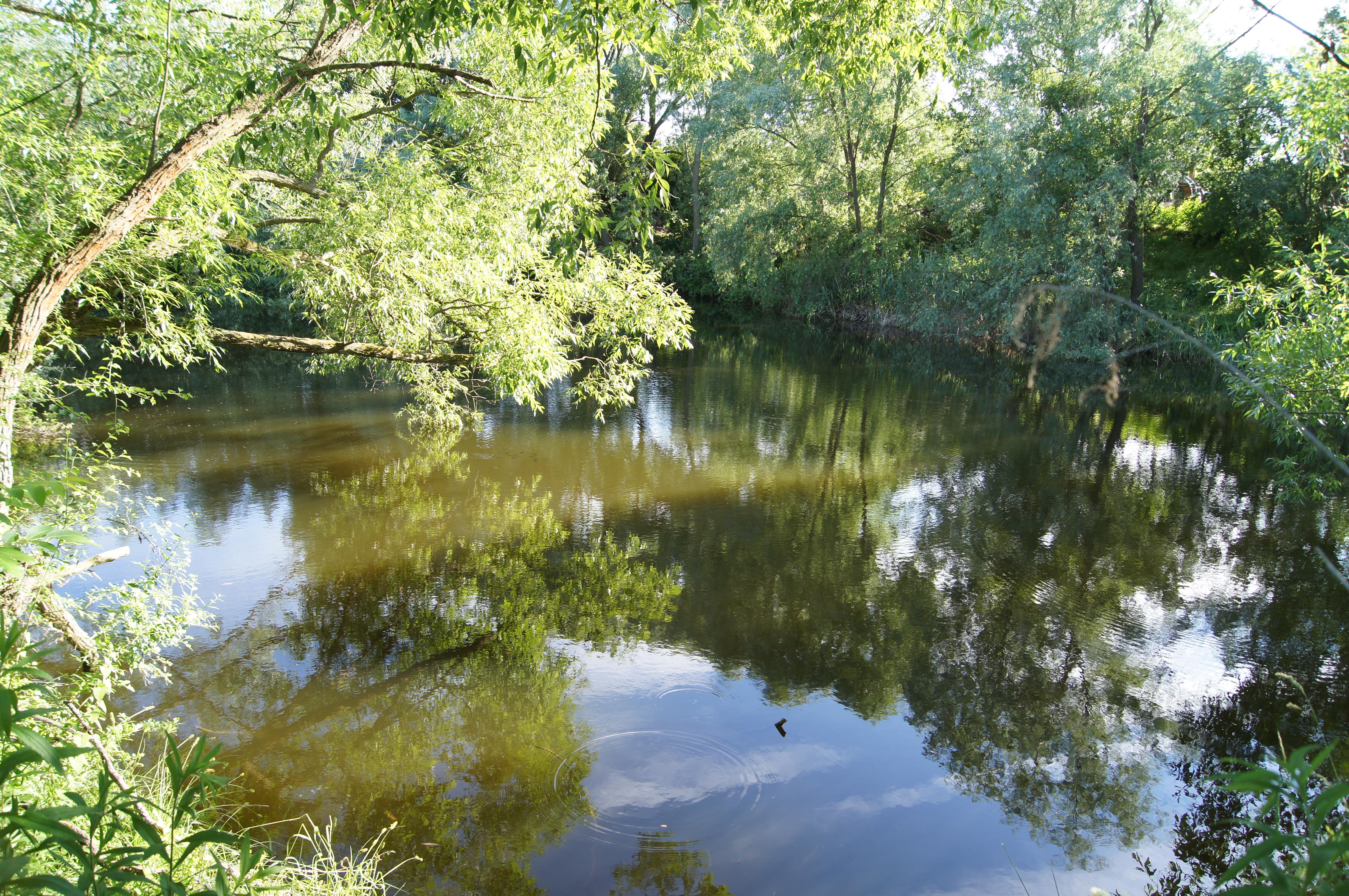 Ziegeleiteich Frankfurt (Oder), Deutschland